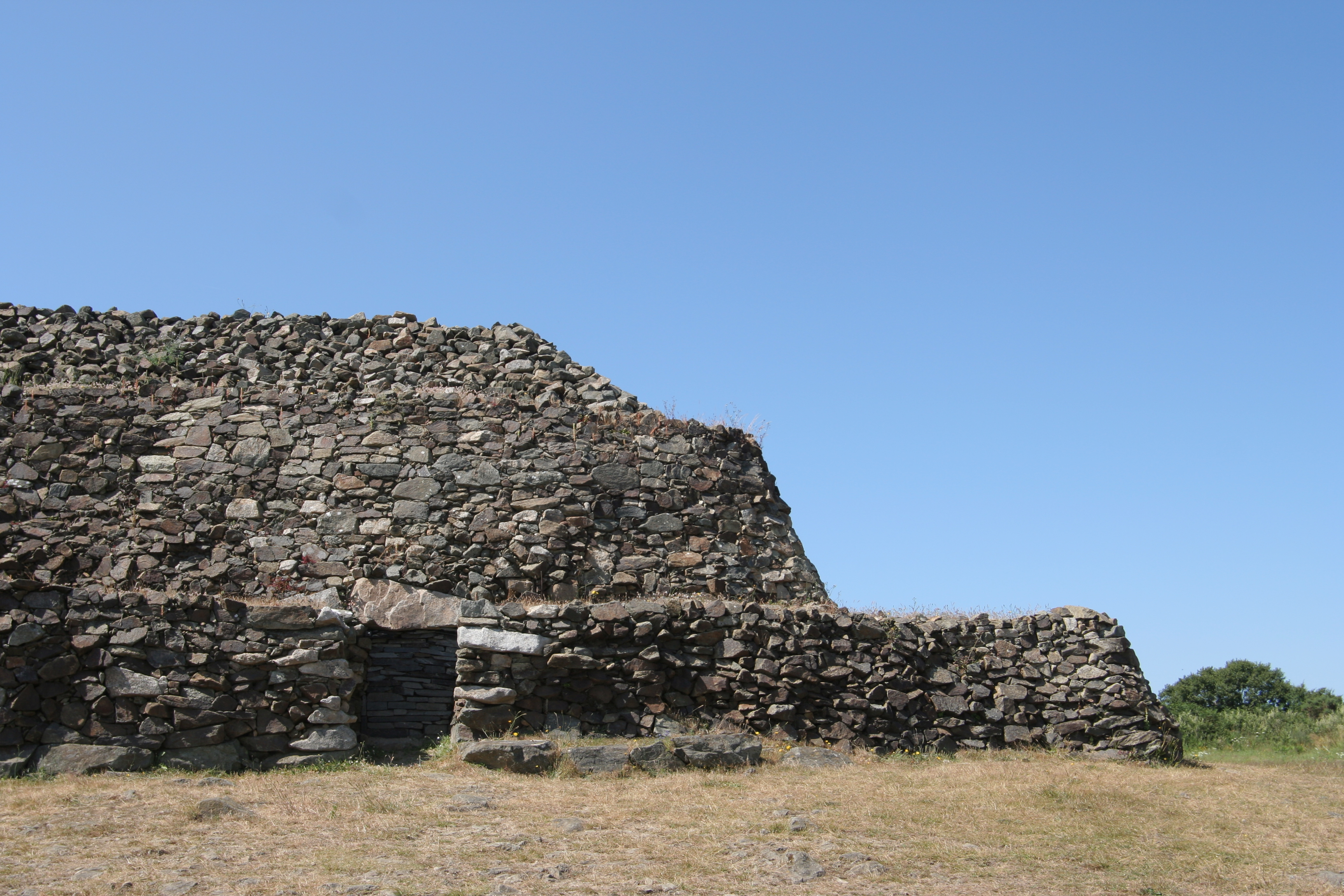 Cairn de Barnenez à Plouezoc'h.